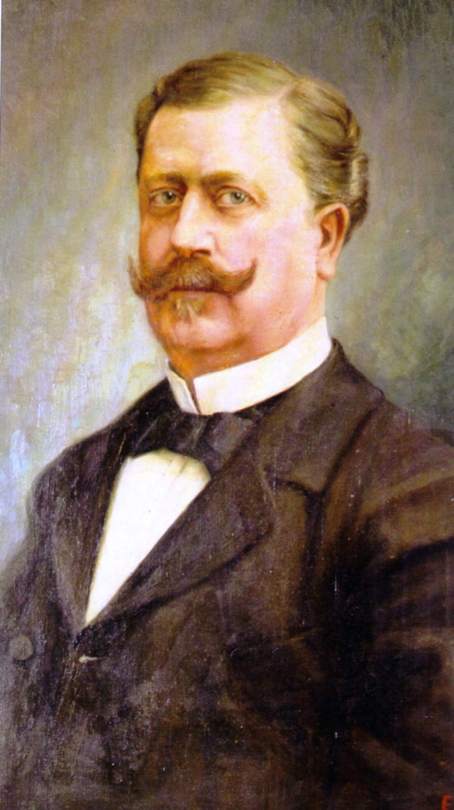 Johann von Gaugreben, Öl auf Leinwand 72x60 cm Original in Privatbesitz